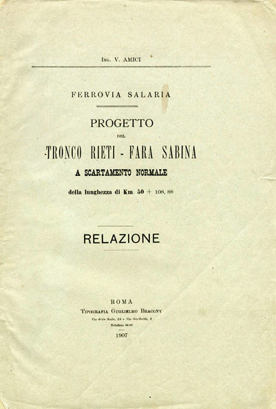 Ferrovia Rieti-Passo Corese (Fara Sabina), parte della Ferrovia Salaria - frontespizio del progetto dell'ingegner Venceslao Amici del 1907